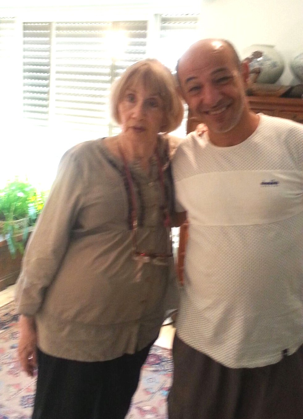 האמנים רות הורם וניהאד דביט